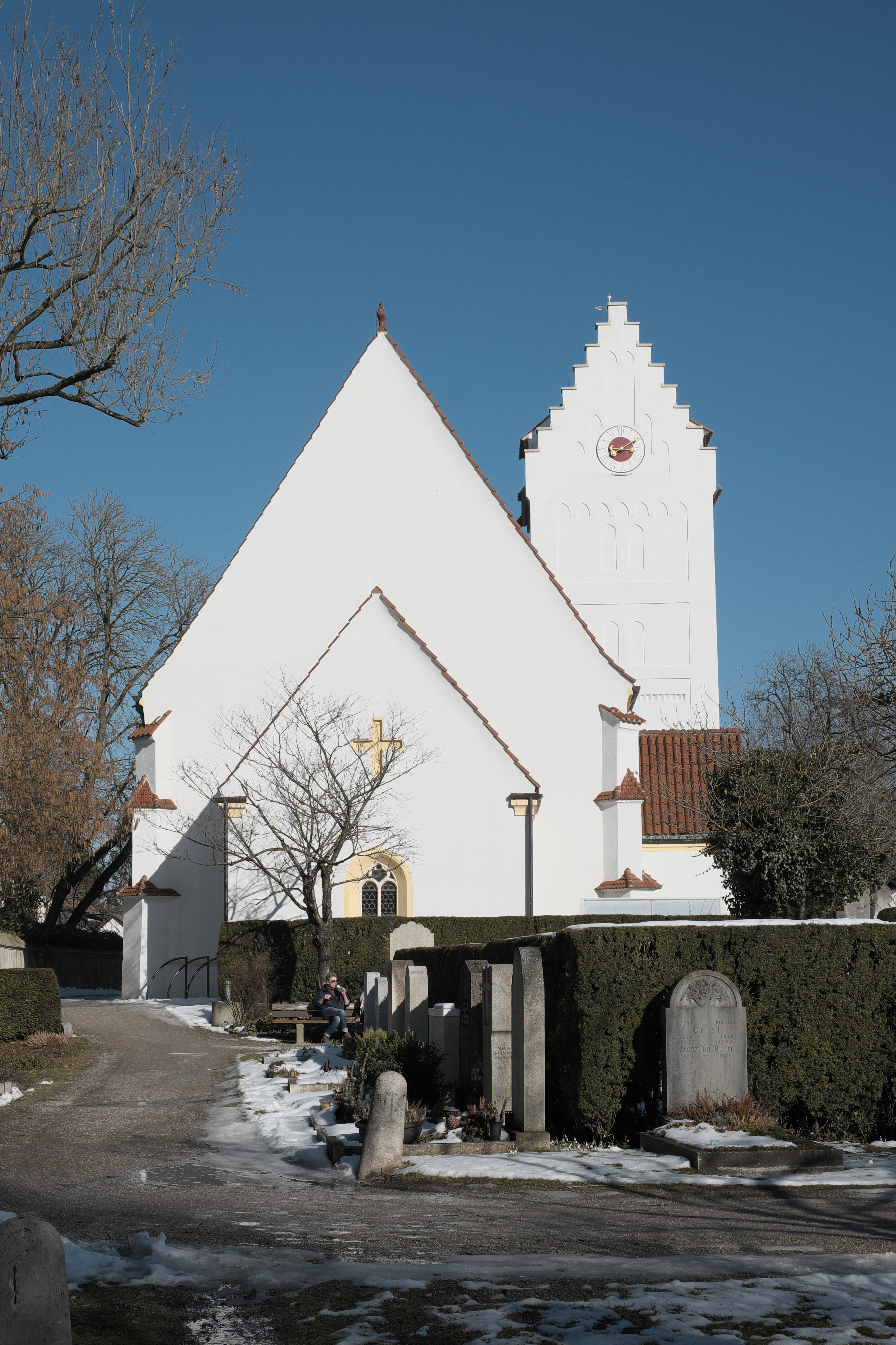 Katholische Pfarrkirche St. Martin in Untermenzing im Stadtbezirk Allach-Untermenzing in München (Bayern/Deutschland)